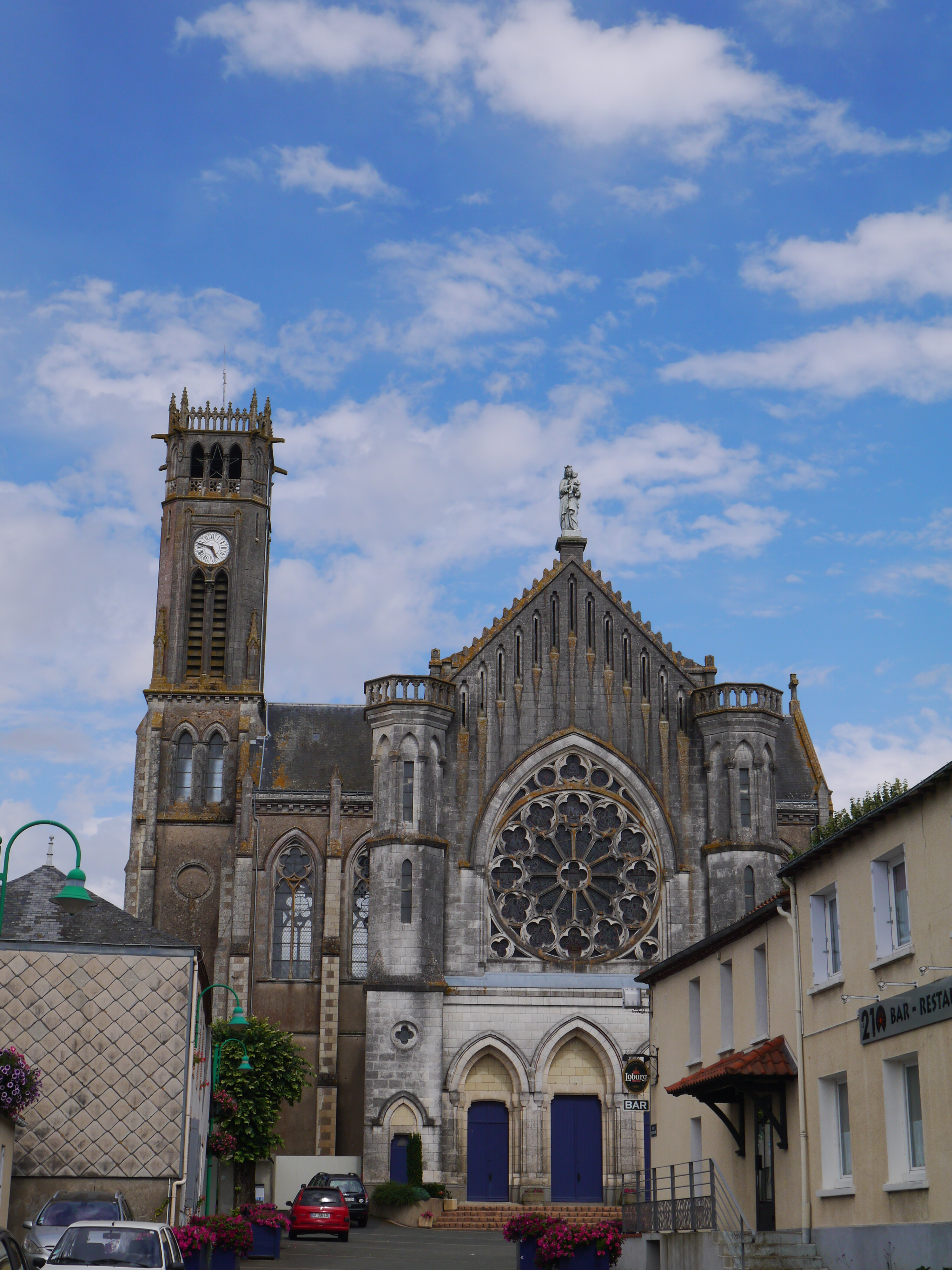 L'abbaye Notre-Dame des Gardes.